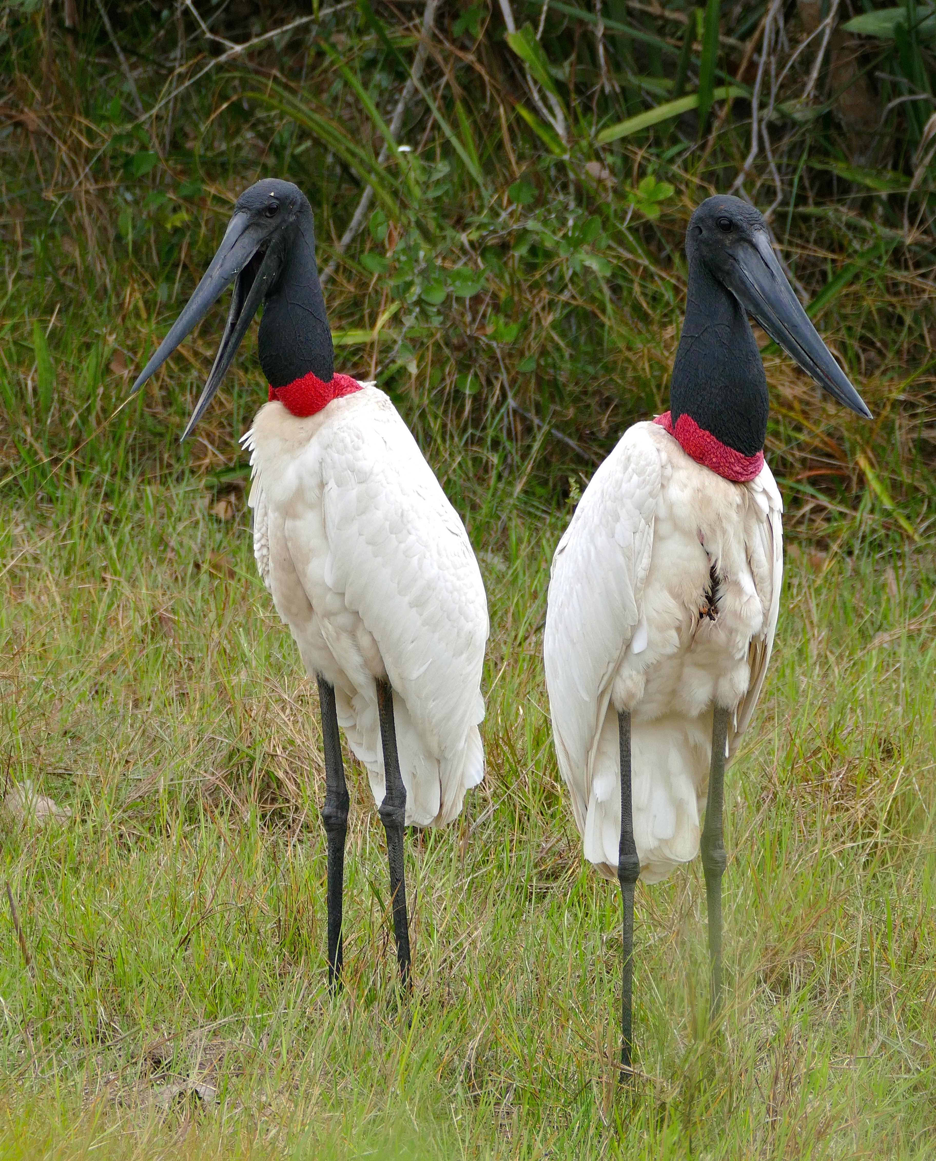 Porto Cercado Road (MT370), Poconé, Mato Grosso, BRAZIL